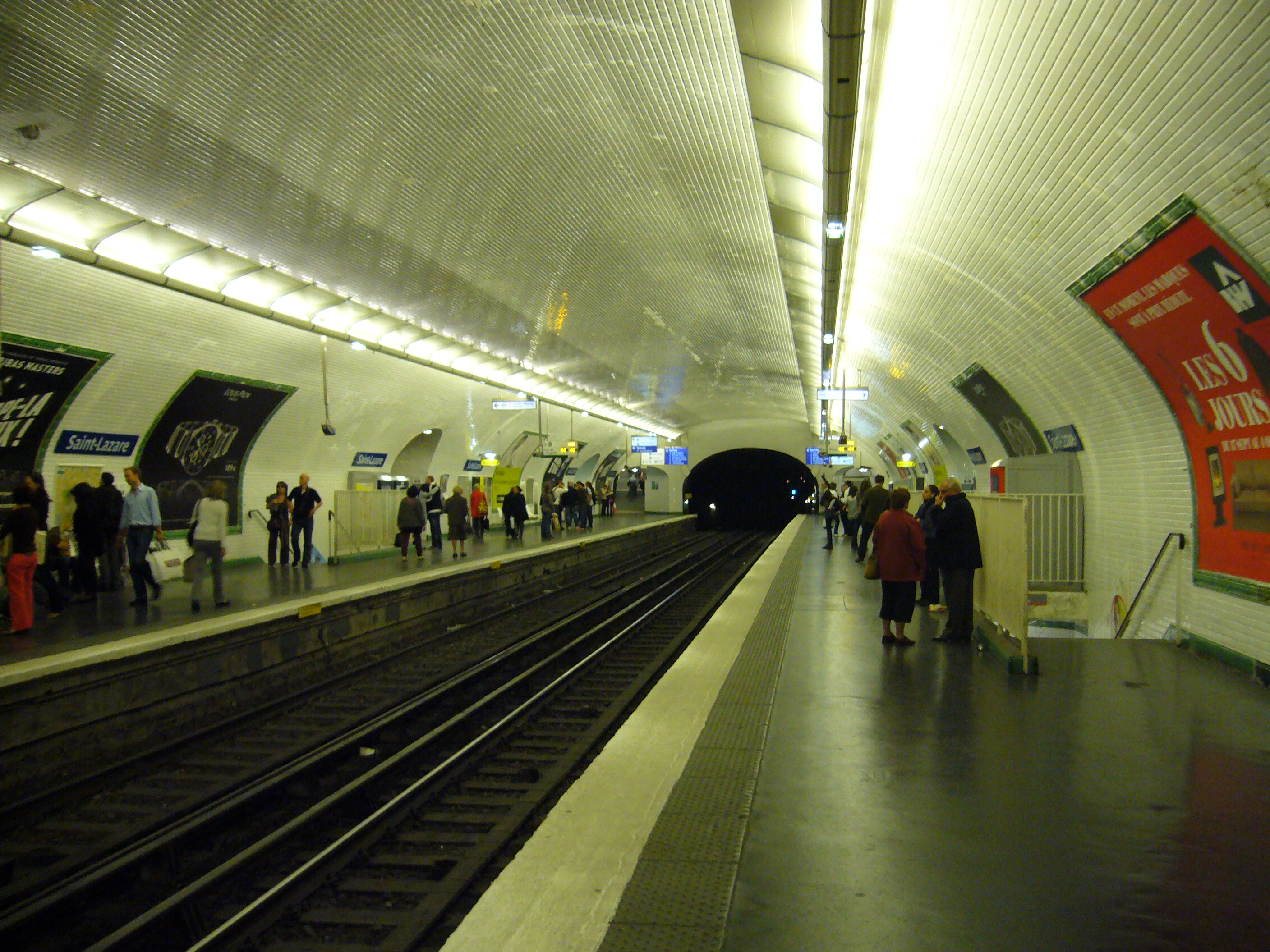 Quais de la station Saint-Lazare de la ligne 12 du métro de Paris.